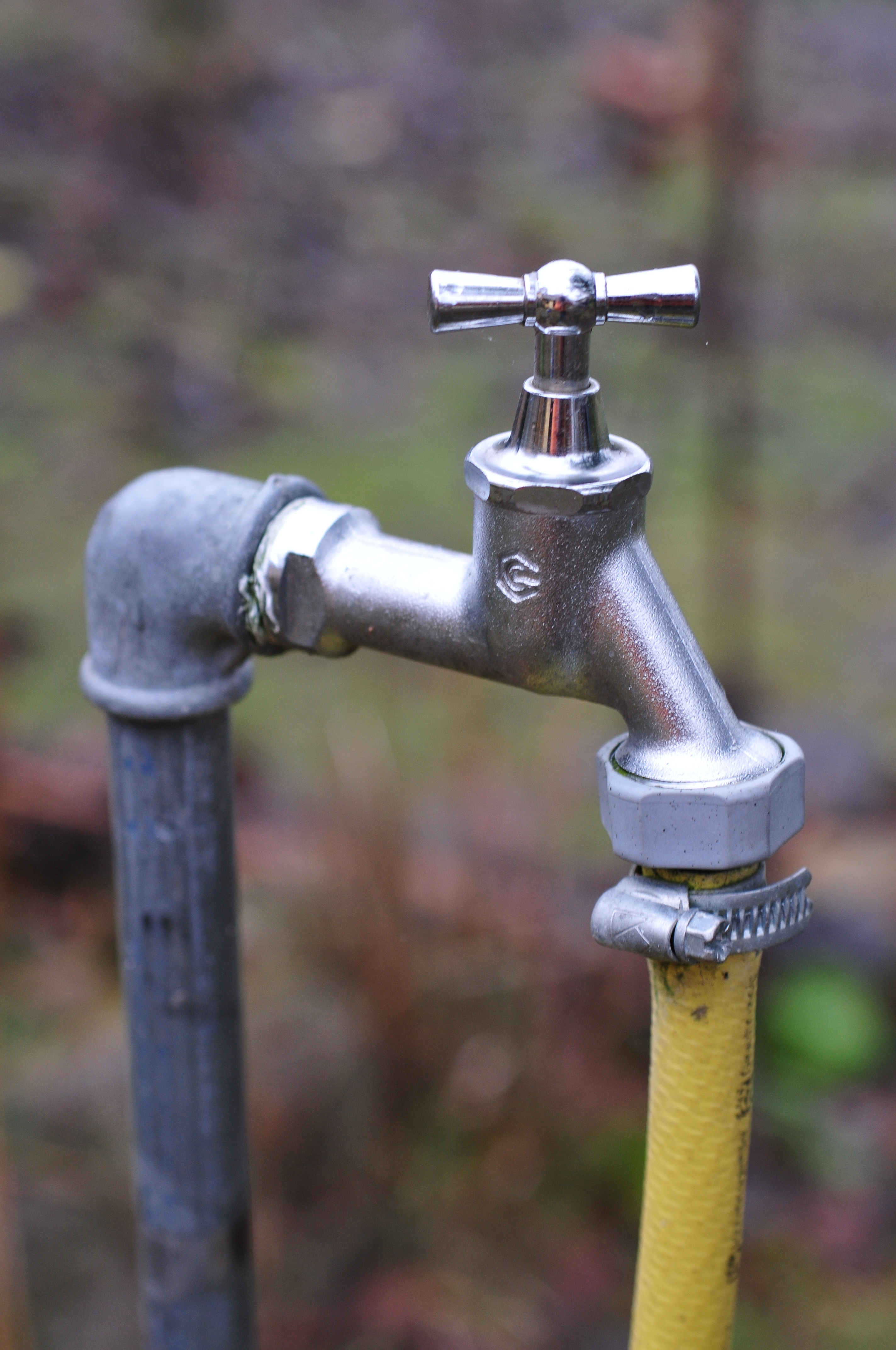 Wasserhahn